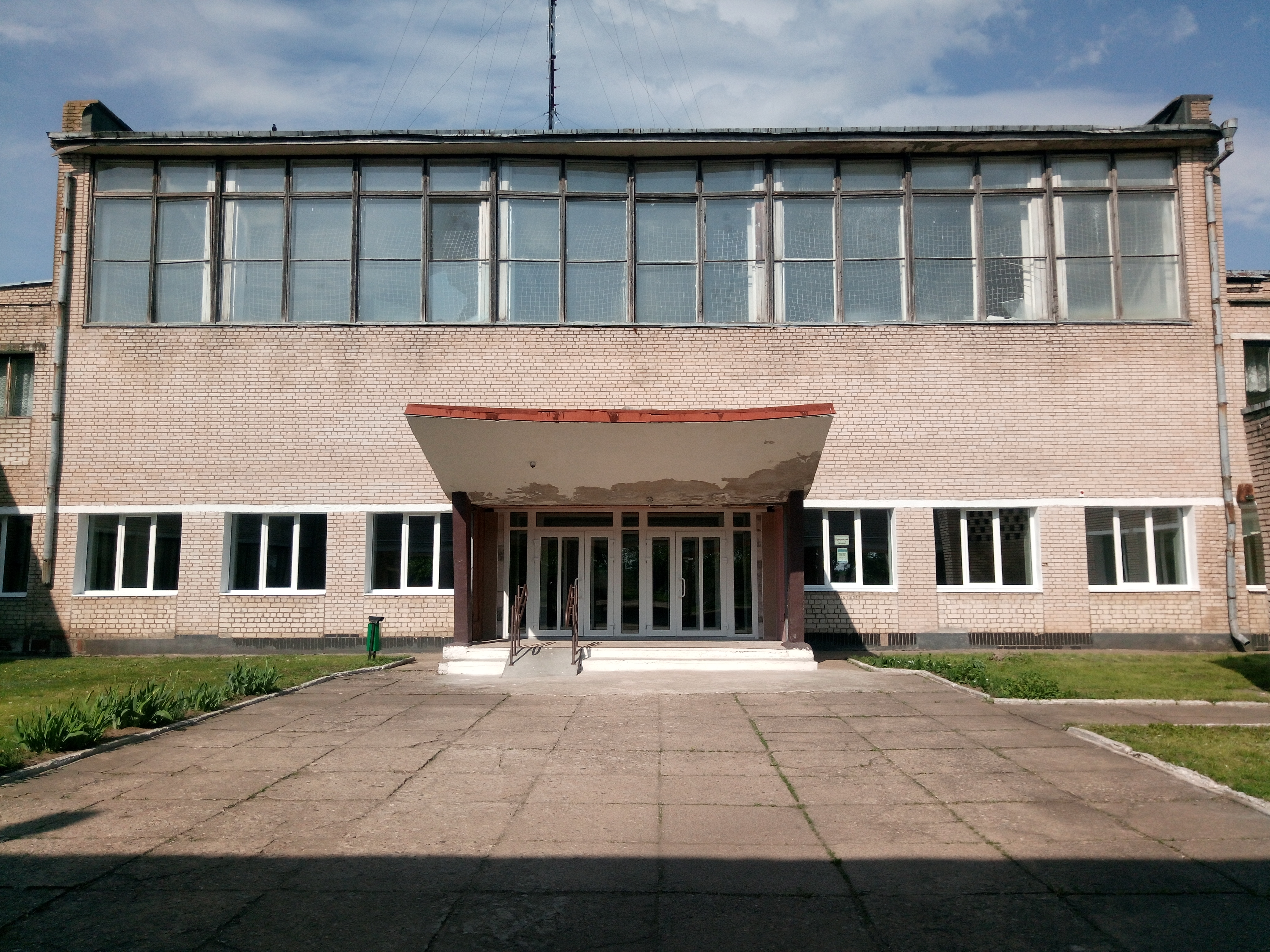 Палац культуры.